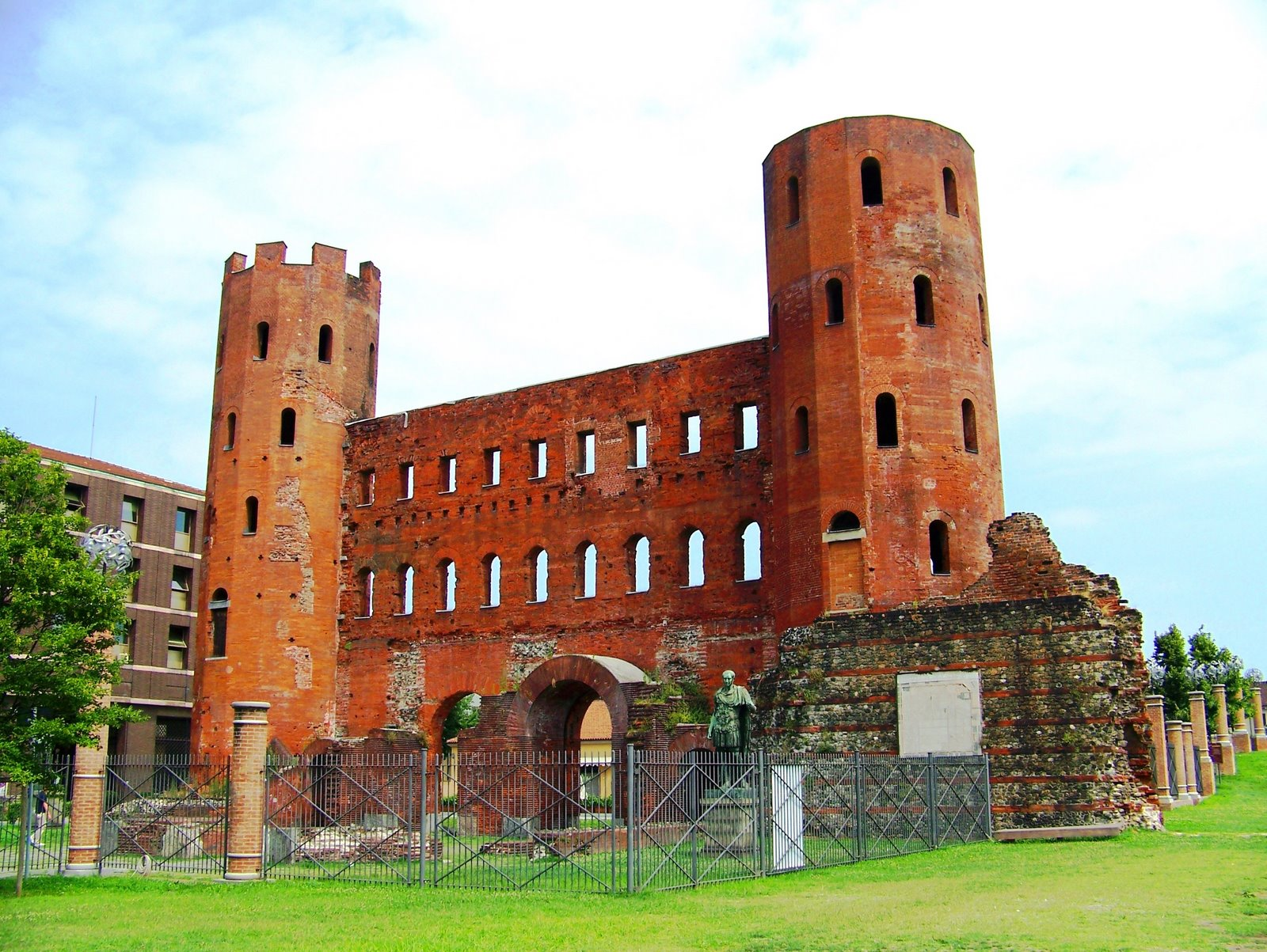 Porta Palatina, Turin